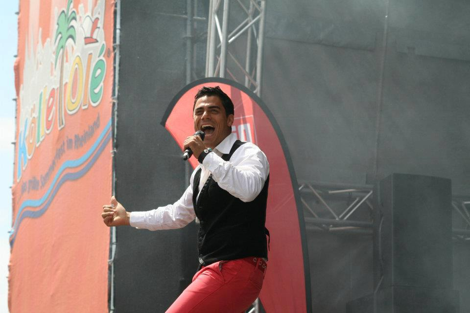 Silva Gonzalez live auf der Bühne